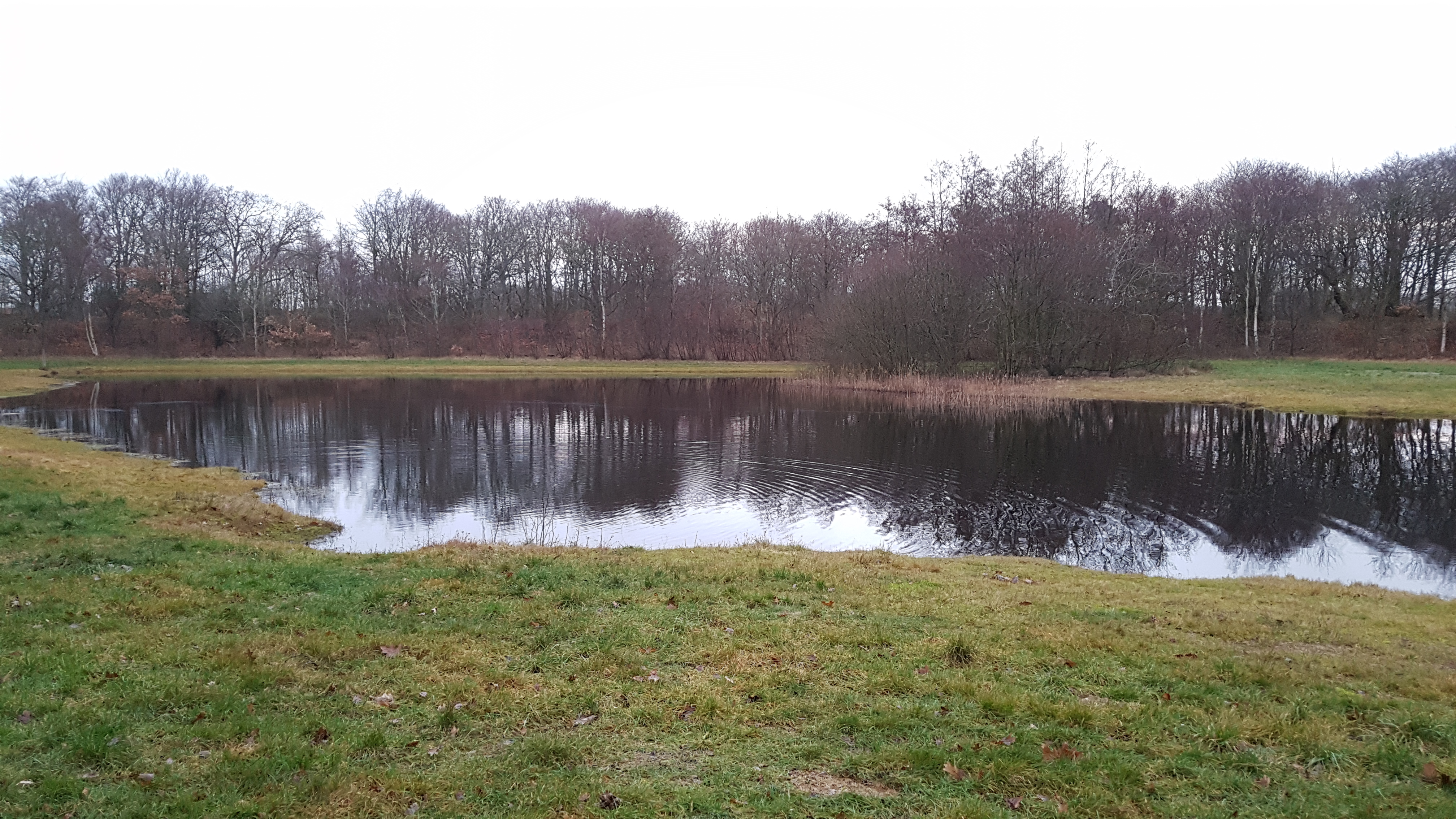 Sildesøen januar 2019, fotograferet fra vest.